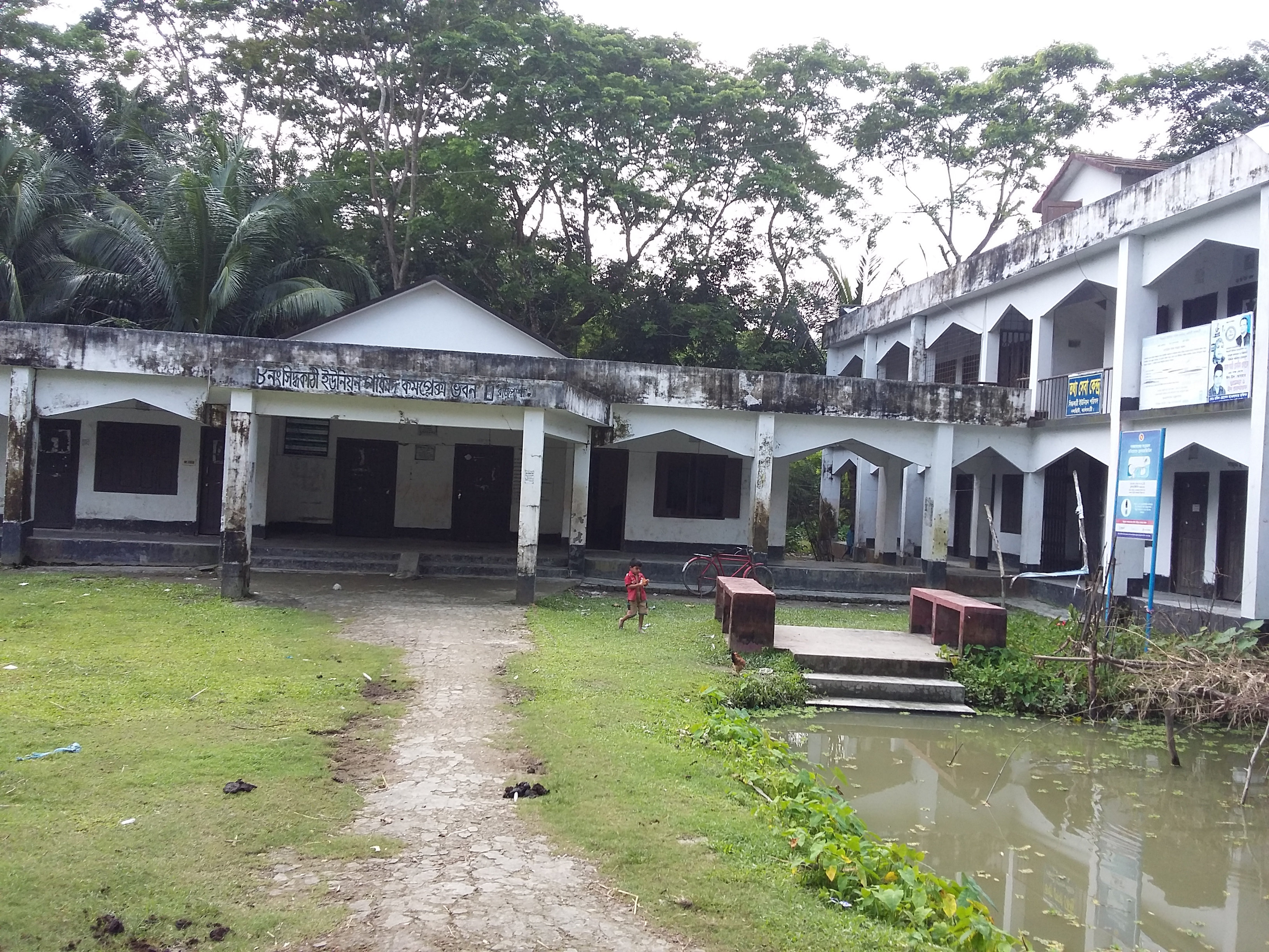 সিদ্ধকাঠী